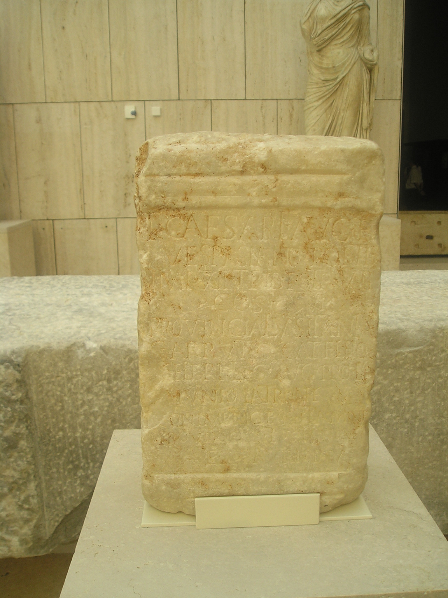 Inscripción honoraria romana depositada en el Museo Arqueológico nacional en Madrid (España) procedente de Mérida (Badajoz, España), correspondiente con CIL II 5264 = ERAEmerita 62 = HEp. 9, 102 = AE 1957, 251 = AE 1982, 486 = AE 1999, 870: T(ito) Caesari Aug(usti) f(ilio) / Vespasiano pontif(ici) / imp(eratori) XII trib(unicia) pote(state) VII / co(n)s(uli) VI / provincia Lusitania / C(aio) Arruntio Catellio / Celere leg(ato) Aug(usti) pro pr(aetore) / M(arco) Iunio Latrone / Conimbrige(n)se flamine / provinciae Lusitaniae / ex auri p(ondo) V